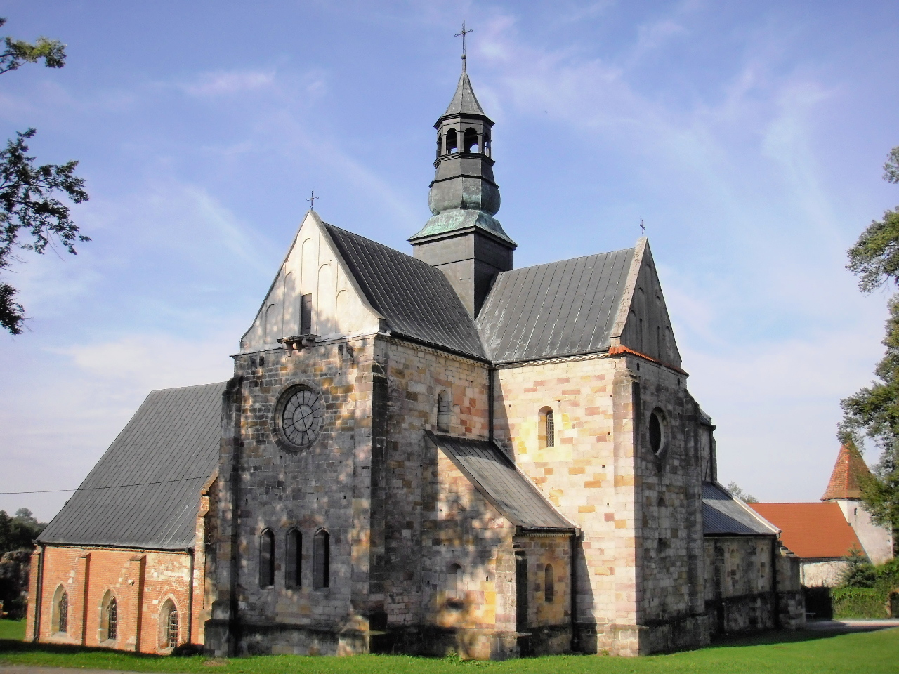 Sulejów, kościół, ob. par. p.w. św. Tomasza, XII, XIV, XVIII